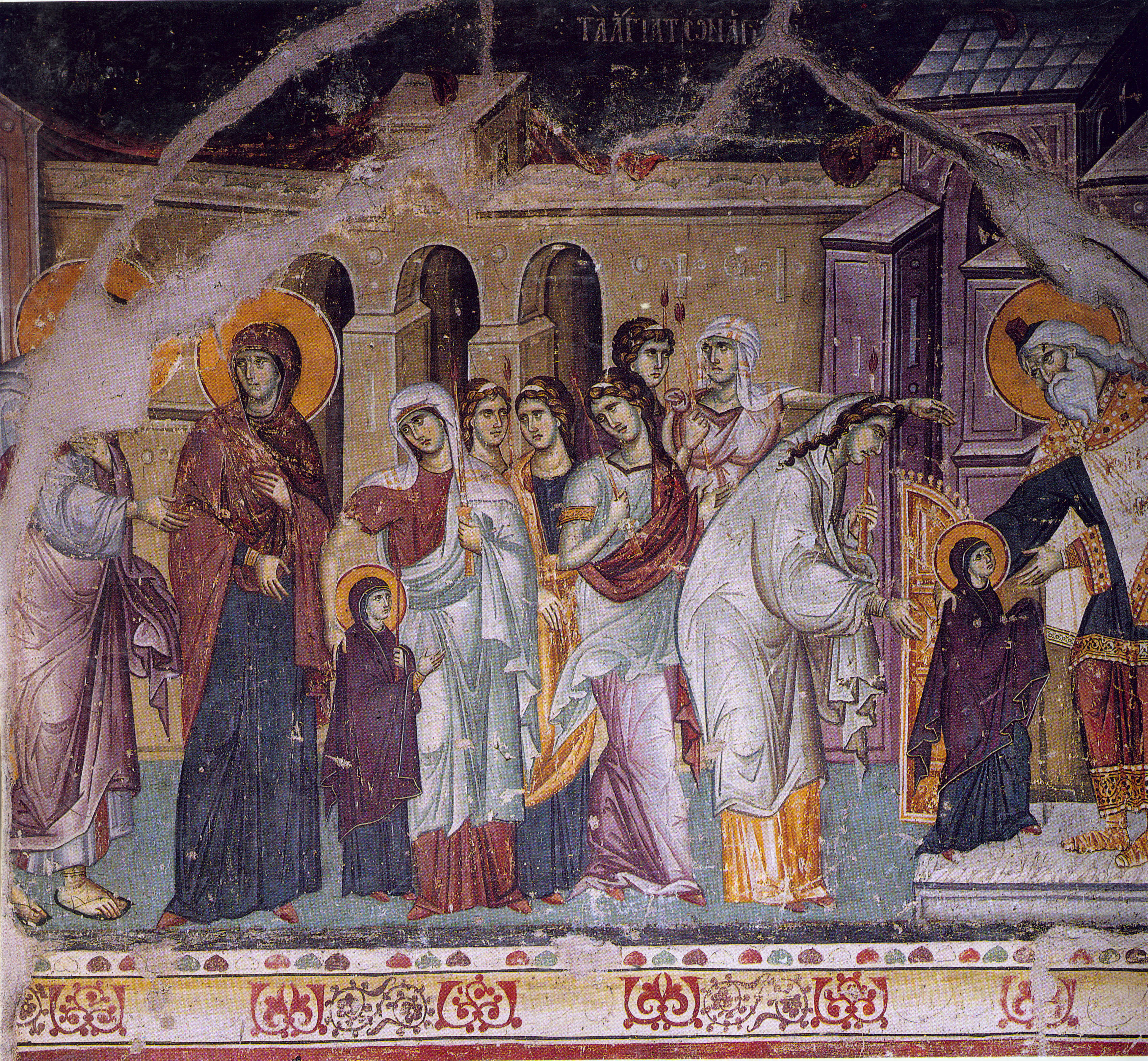 Введение во храм Пресвятой Богородицы в Протате